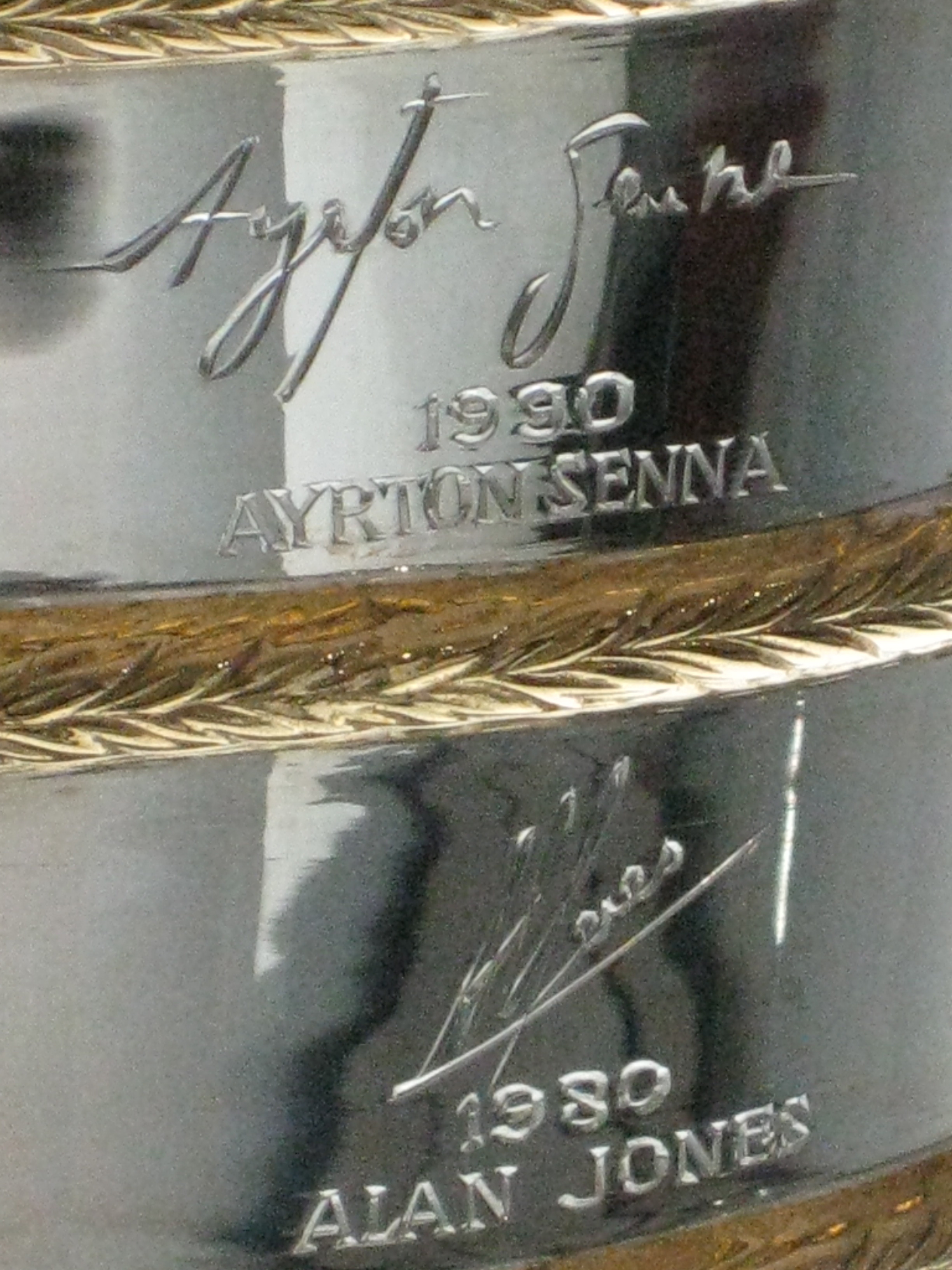 Copa de la FIA de campeón del mundo, detalles de las firmas de los diferentes campeones del mundo en la copa